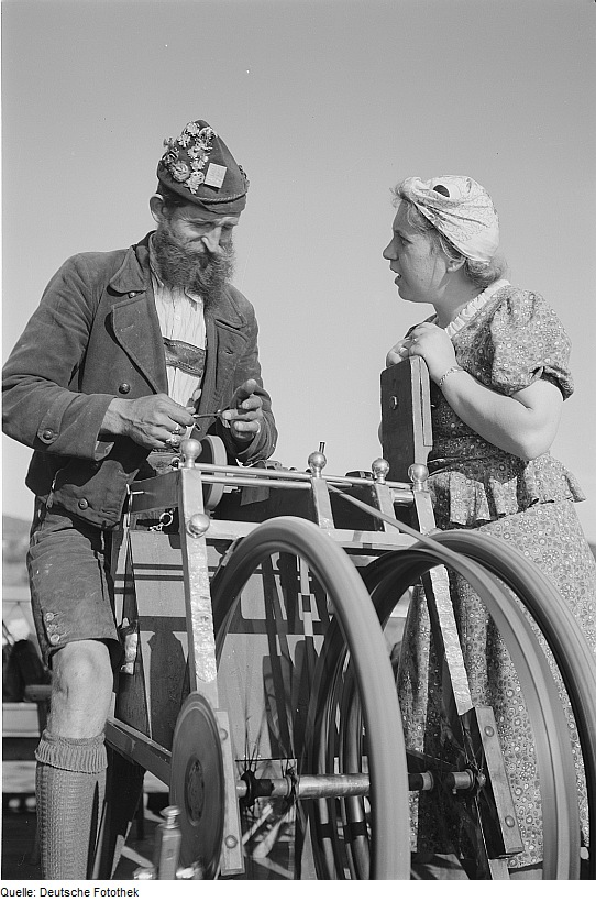 Original image description from the Deutsche Fotothek Scherenschleifer